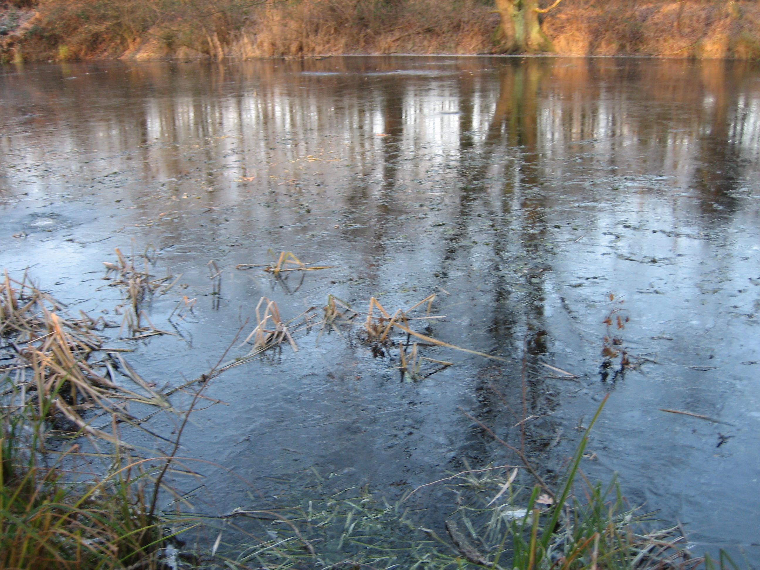 Der Woogsee bei Rastatt im Januar 2008